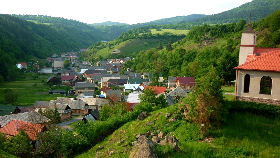 Nad Ihračom